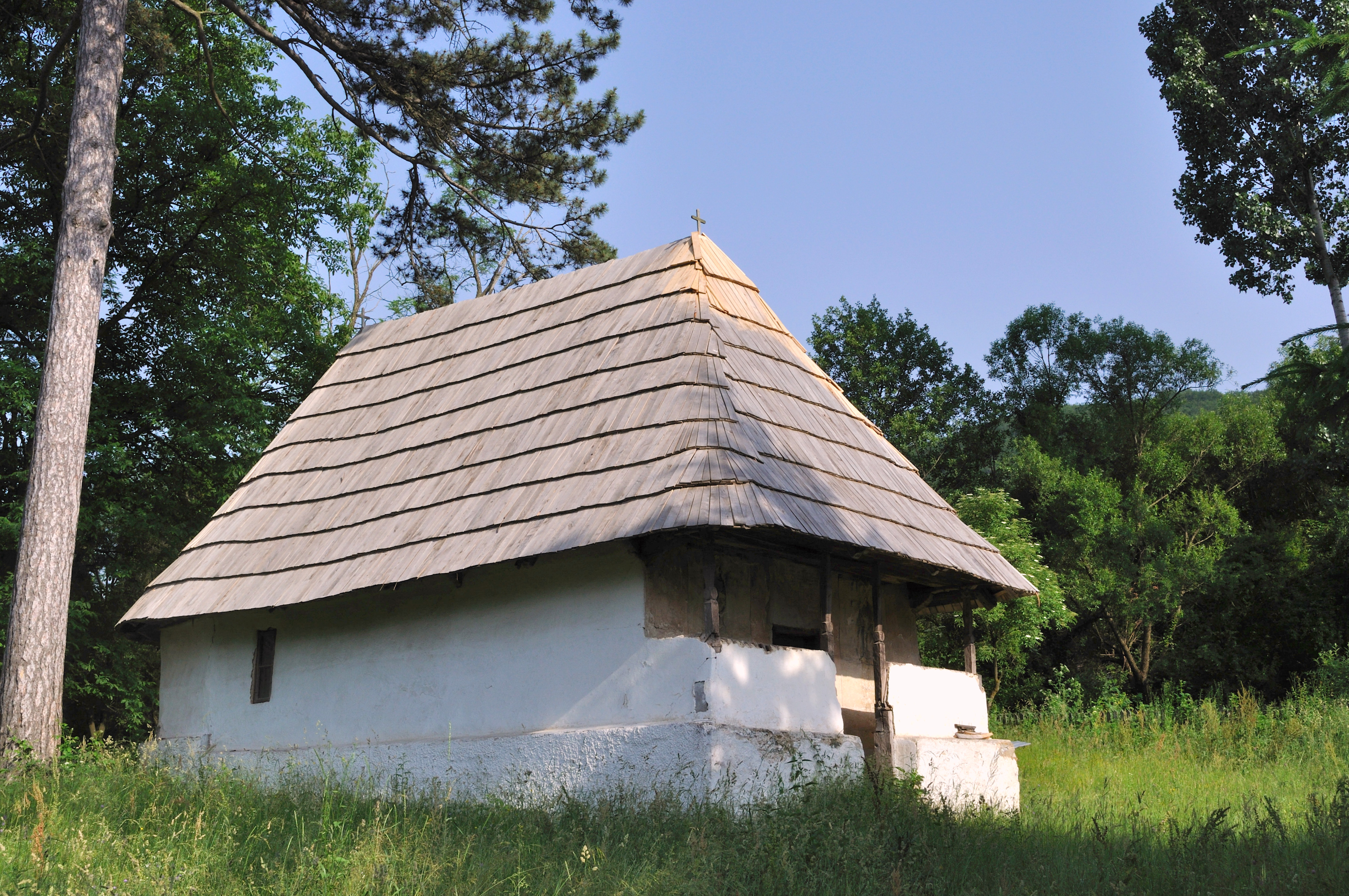 Biserica de lemn „Sf.Voievozi” din Izverna, Mehedinți